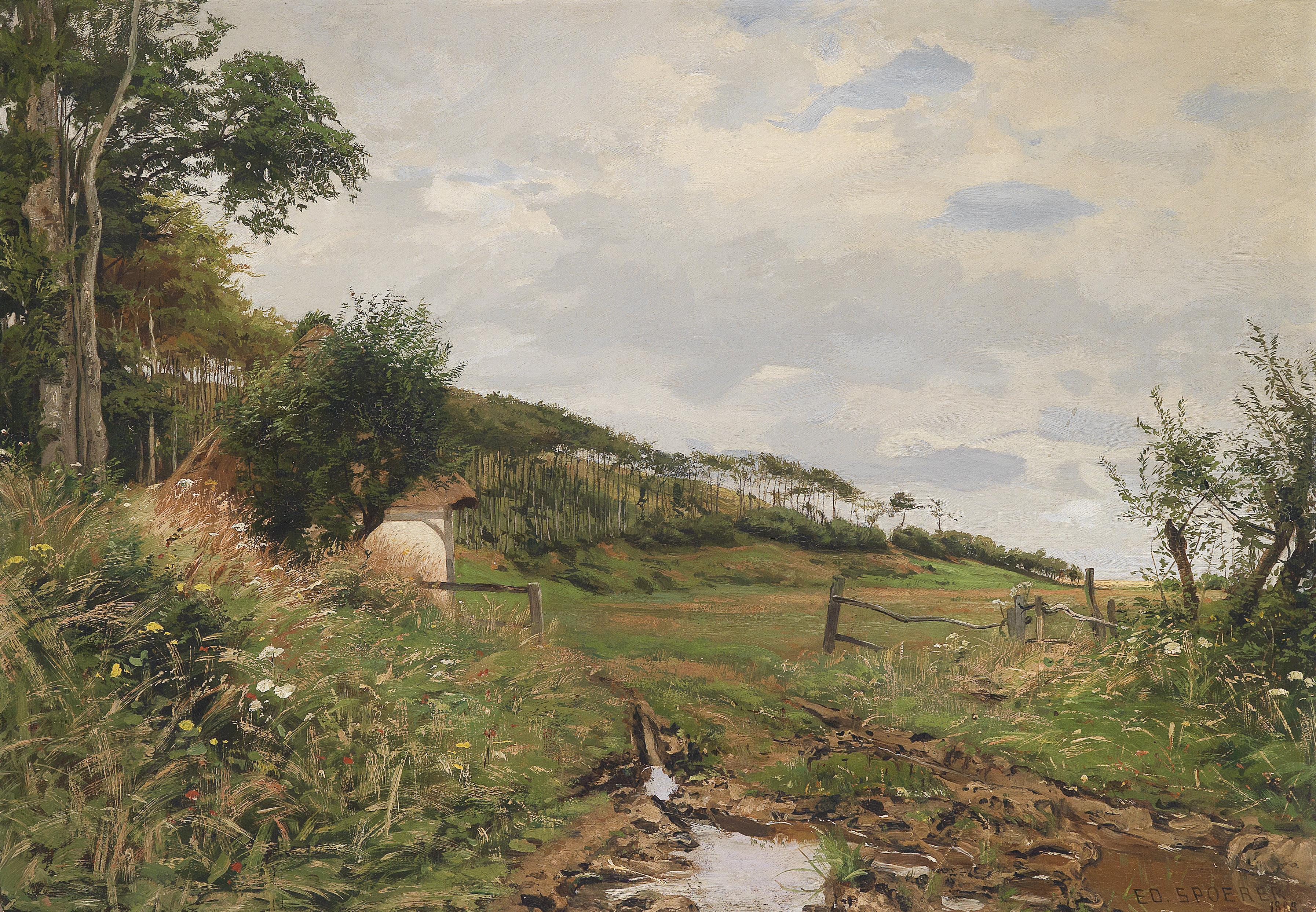 Sommerwiese signiert, datiert Ed. Spoerer 1883, Öl auf Leinwand auf Platte, 45 x 65 cm